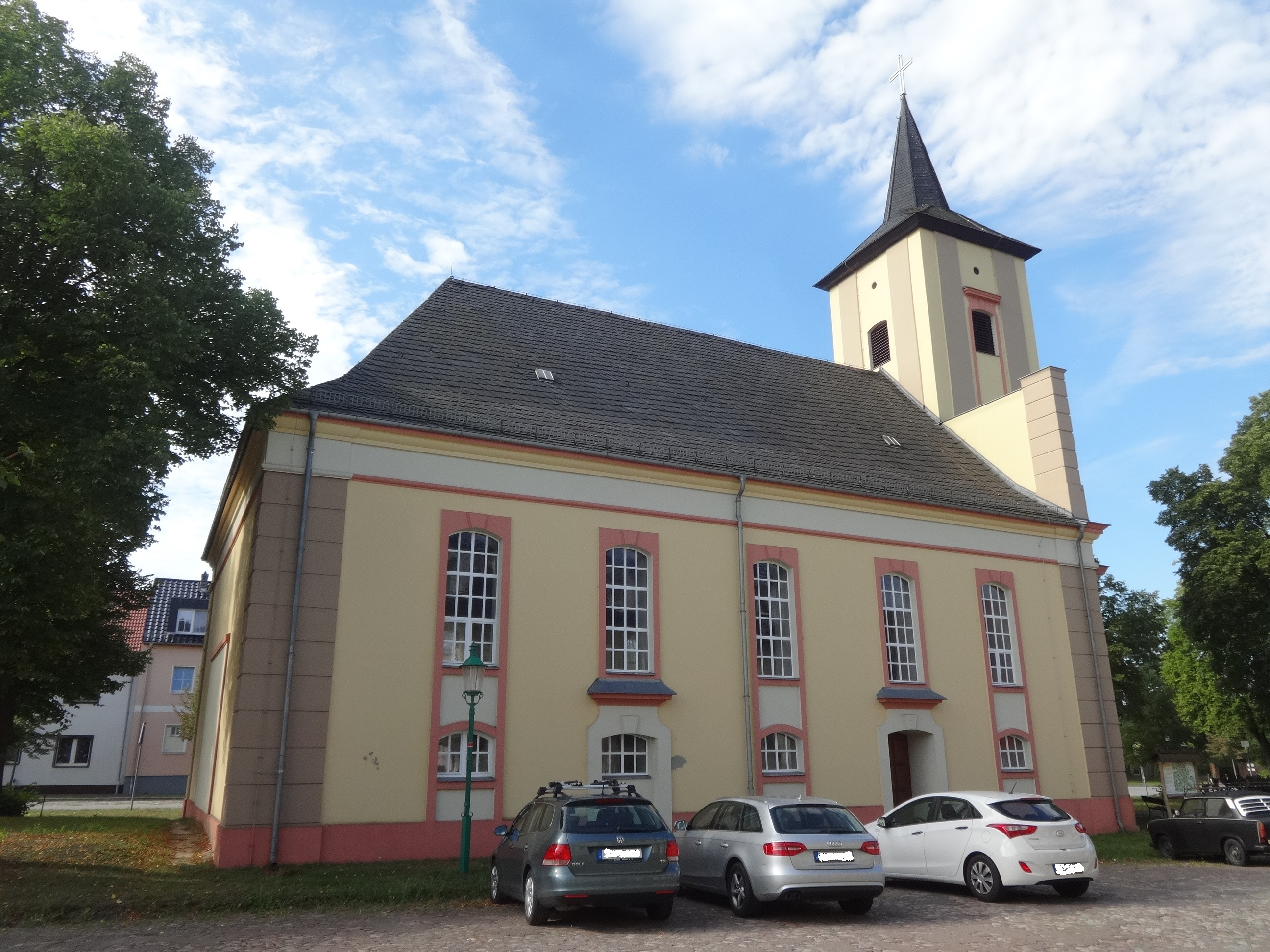 Die Dorfkirche in Märkisch Buchholz ist ein Kirchenbau aus dem Jahr 1753, der auf einen Vorgängerbau aus dem 14. Jahrhundert zurückgeht. Er wurde von August Wilhelm von Preußen, dem jüngeren Bruder von Friedrich II. finanziert. Das Bauwerk konnte in den 2000er Jahren sukzessive saniert werden.